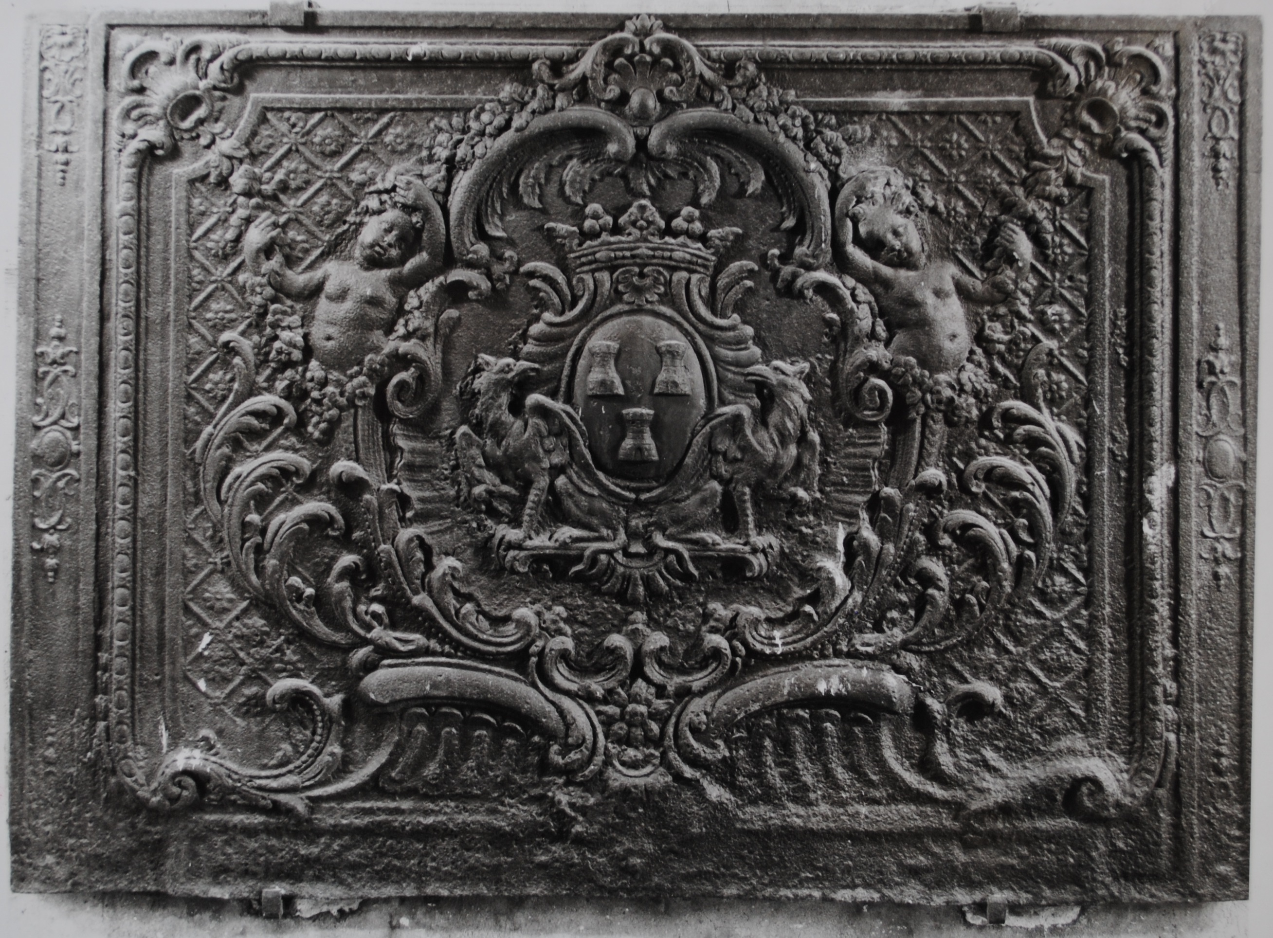 Taque foyère aux armes de Mme de Pompadour, provenant du château de Bellevue, vers 1750. Musée d'art et d'histoire de Meudon.